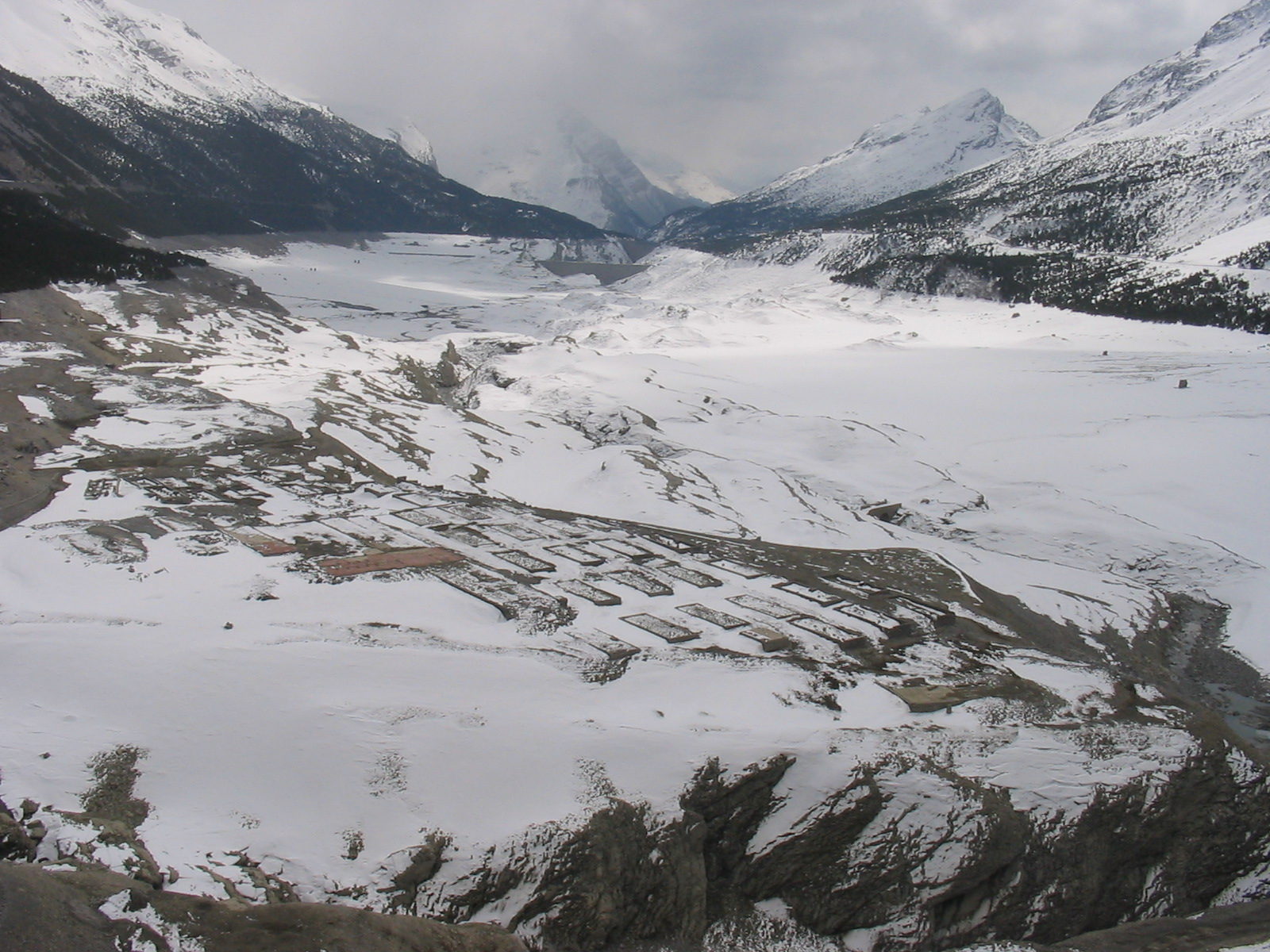 Fotografia amatoriale delle Dighe di Cancano in Valtellina vuote nel periodo invernale.